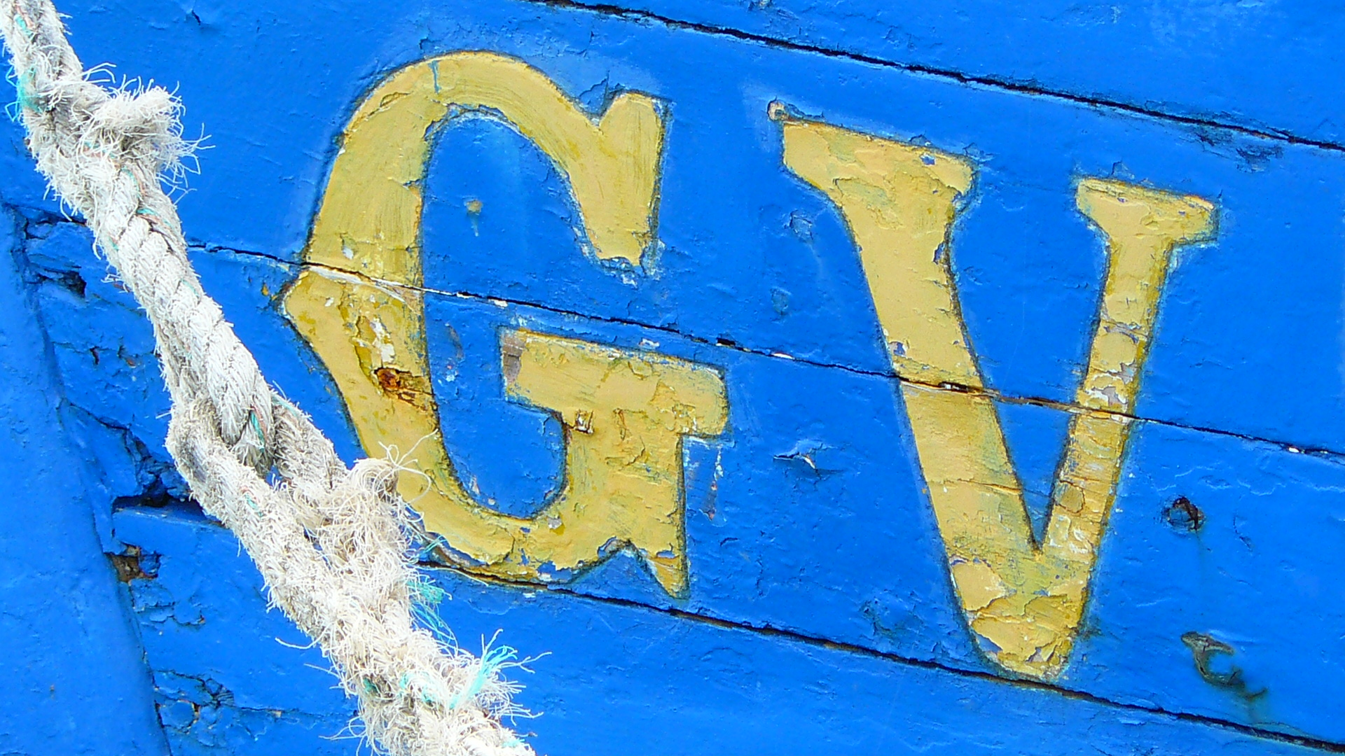 Initiales précédant, sur la coque, le numéro de tous les bateaux du quartier d'immatriculation GV (anciennement quartier maritime du Guilvinec), au sud-ouest du Finistère, en Bretagne.